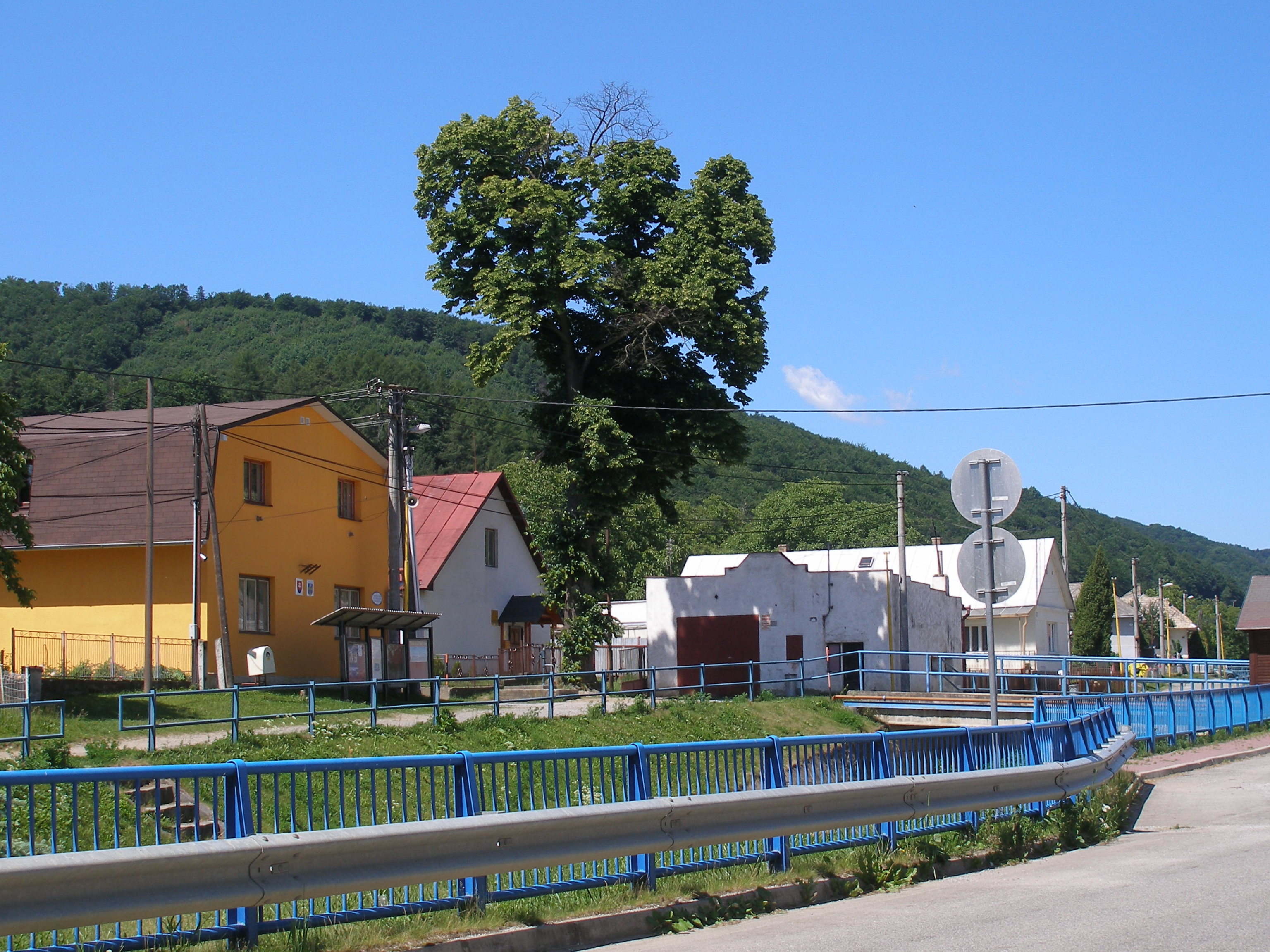 Obec Uzovské Pekľany okres Sabinov